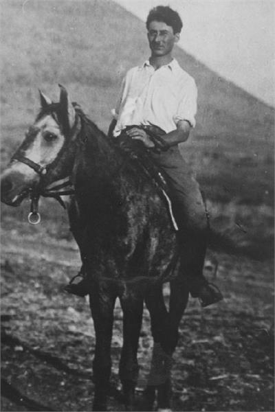 גלבוע - ד"ר זס למרגלות התבור